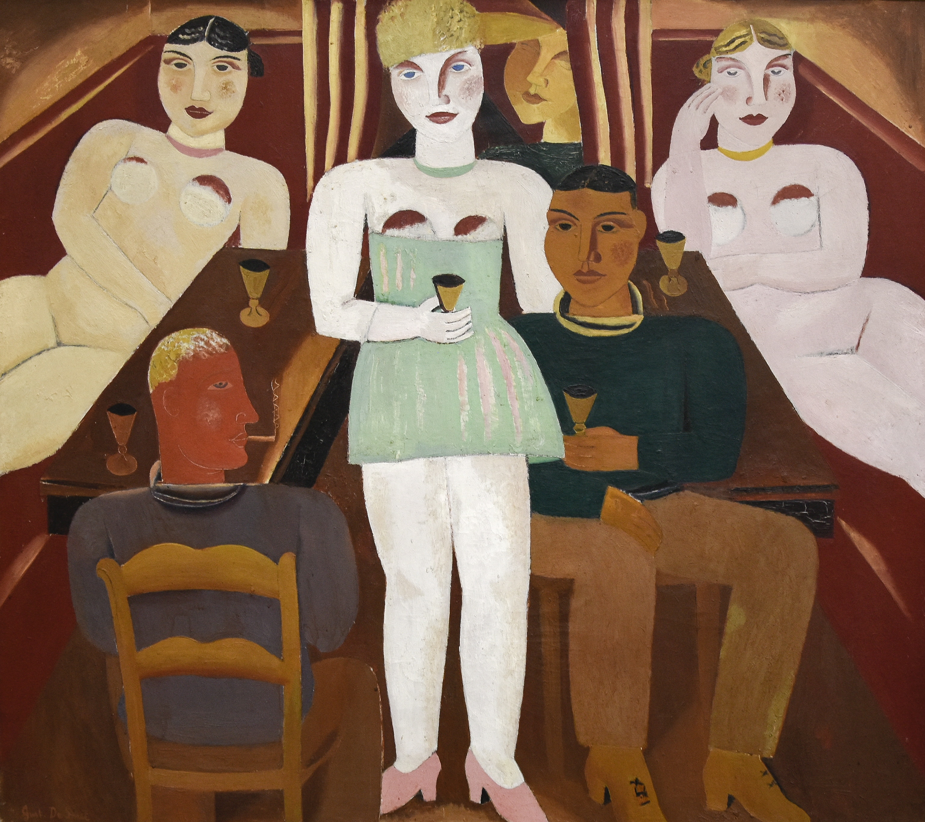 Gustave De Smet (1877-1943) Het goede huis (1926) MSK Gent